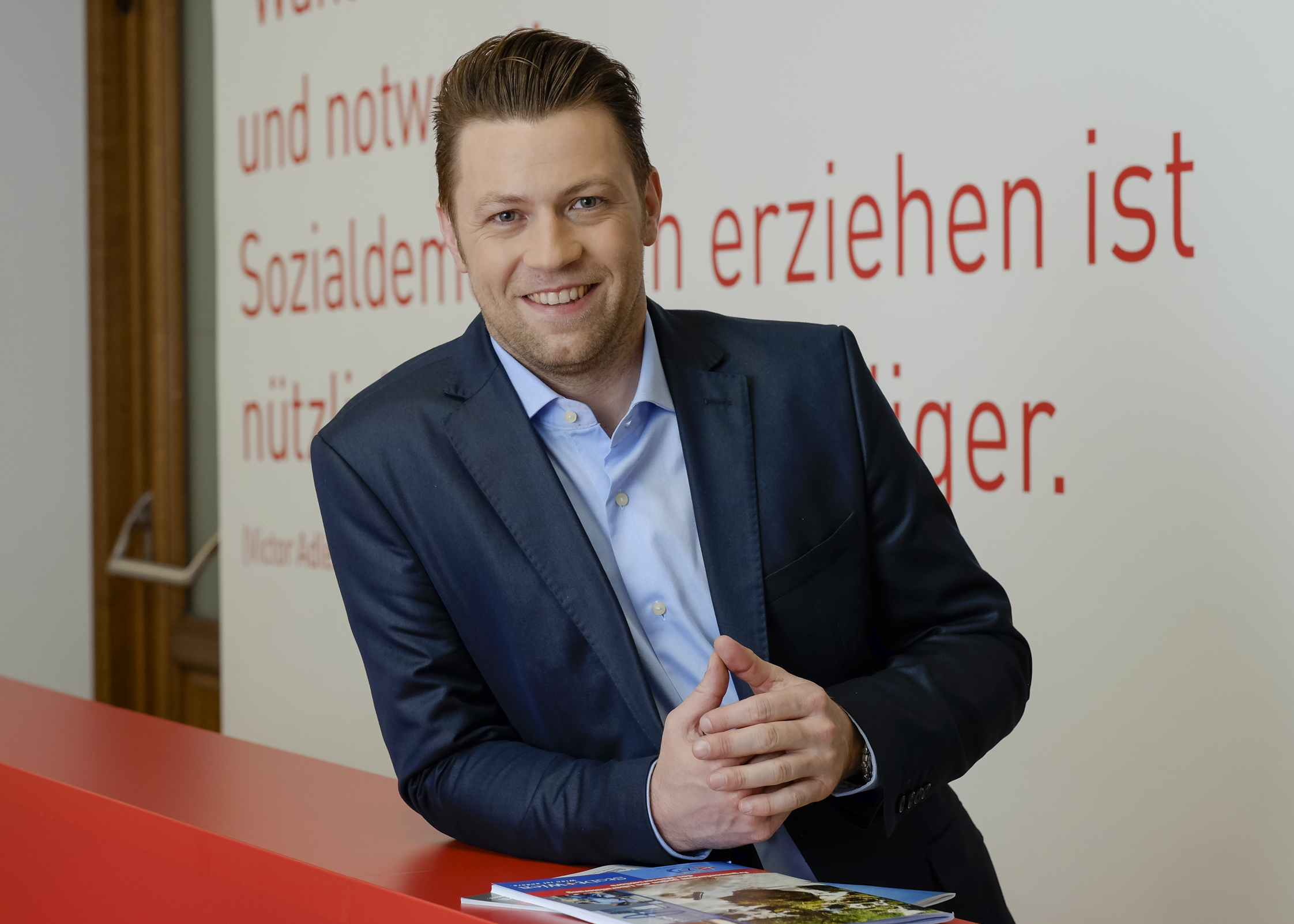 Landtagsabgeordneter Marcus Schober / SPÖ Wien